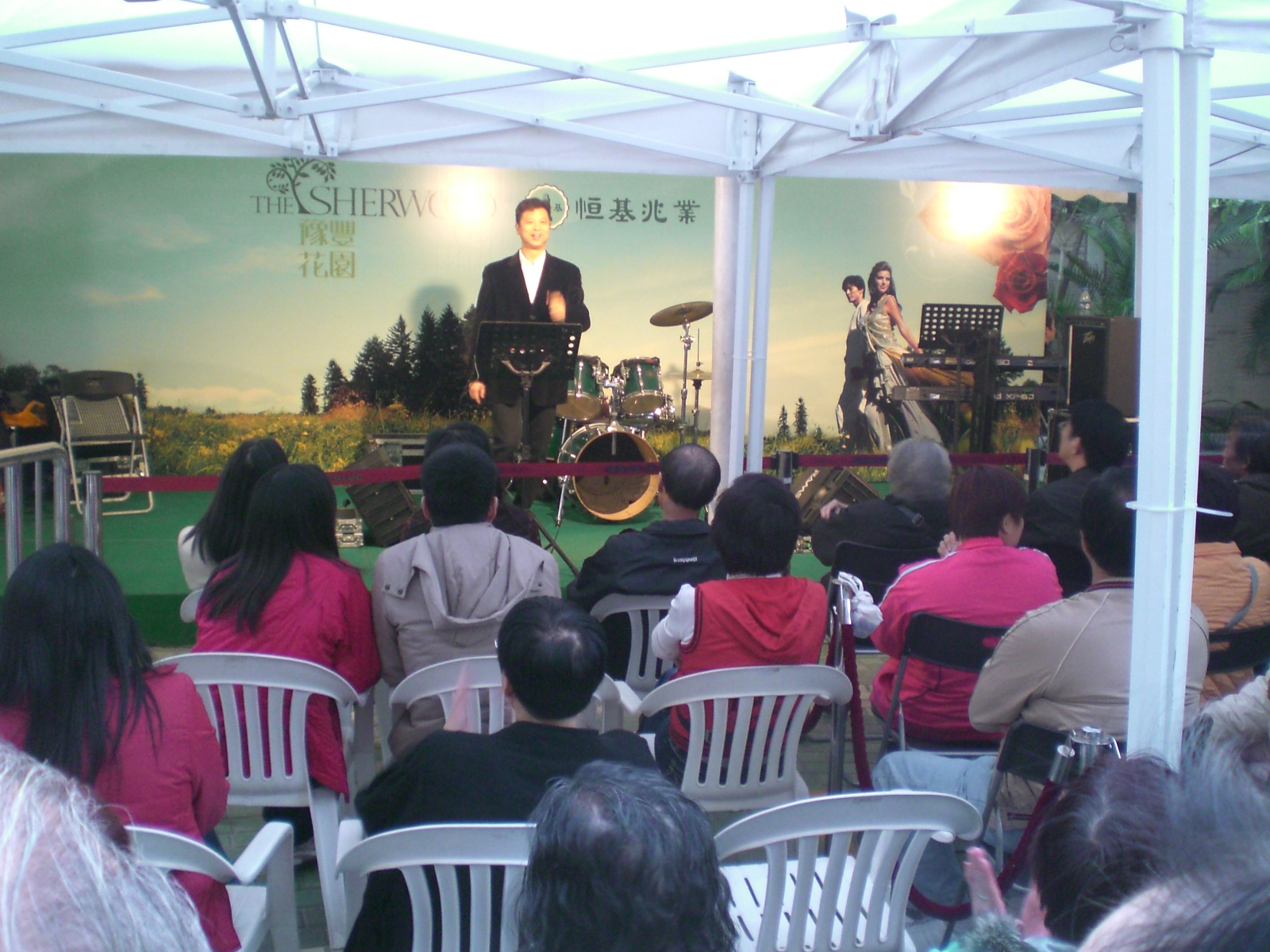 豫豐花園工地秀